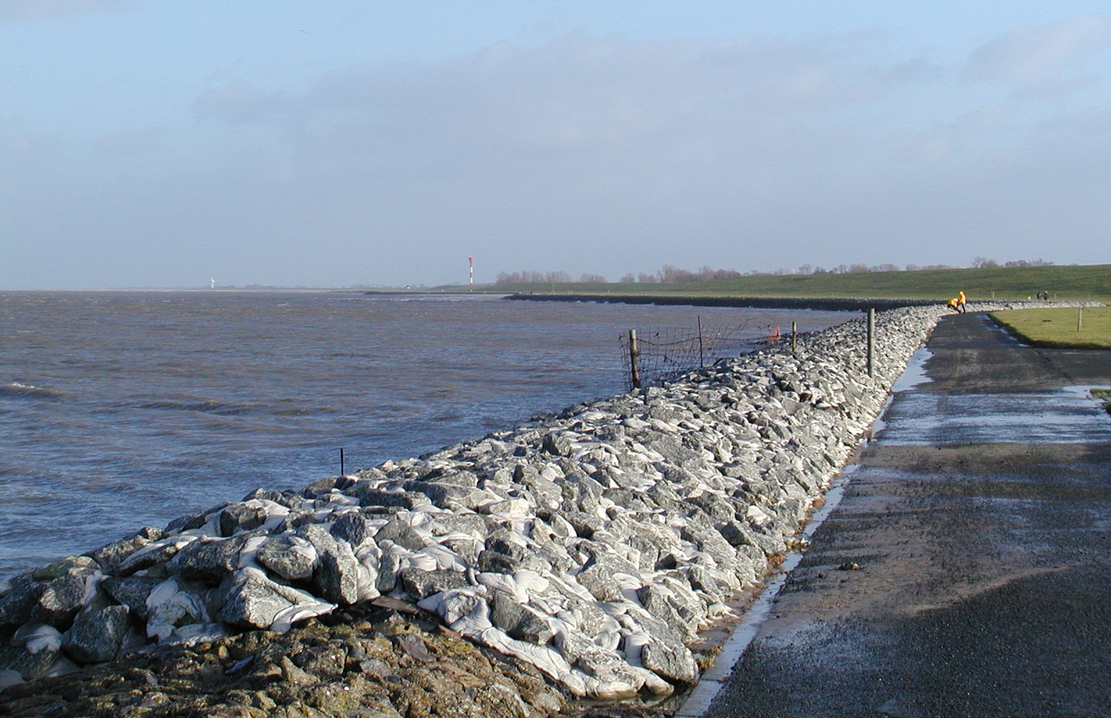 Die Deichlinie in Richtung Otterndorf, Im Hintergrund der Leucht und Radarturm